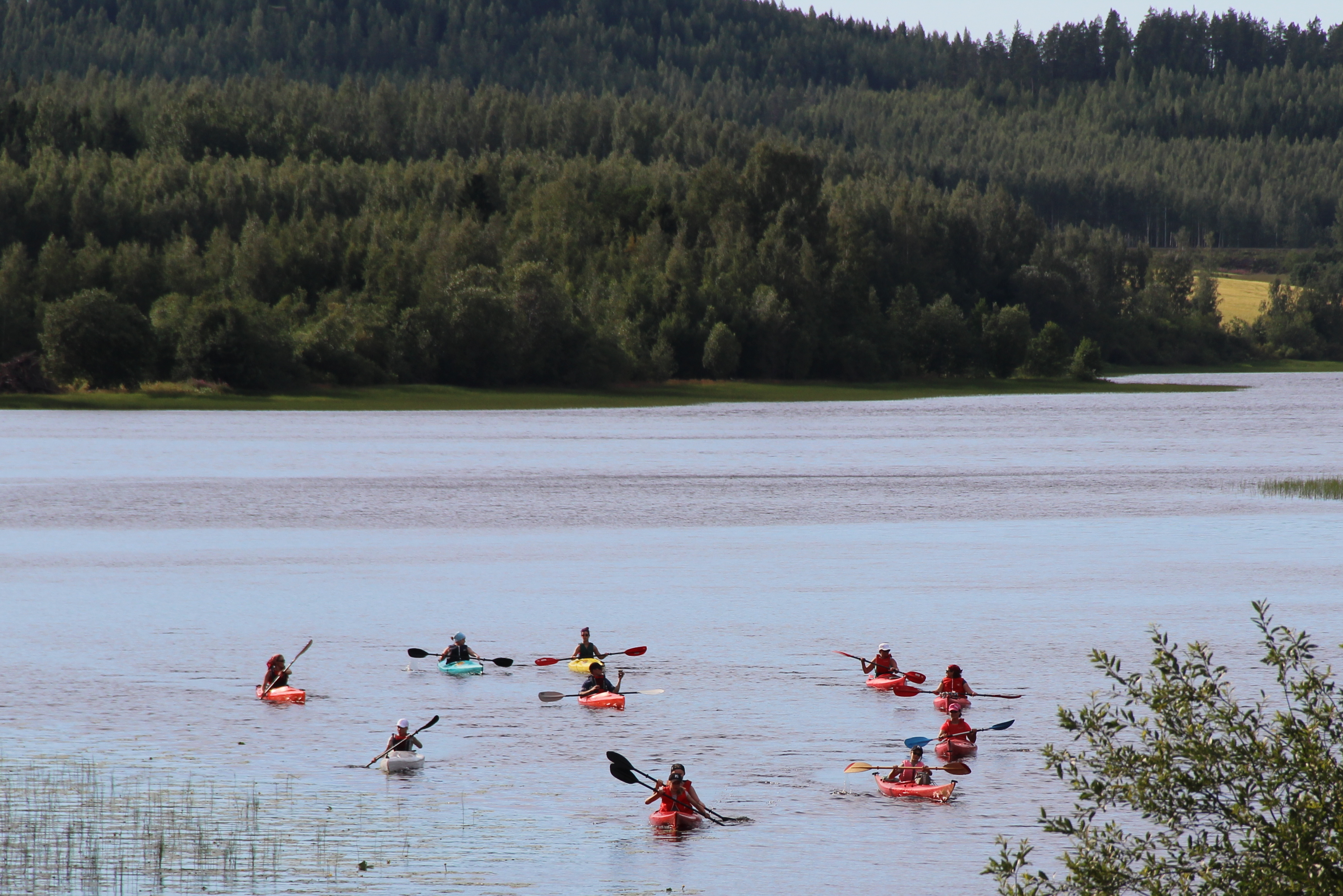 Melojaryhmä Laasojärvellä, Kaivannonjoen suulla.